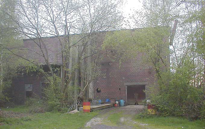 Das verlassene Fördermaschinenhaus des stillgelegten Kohlenbergwerks Minden bei Minden in Nordrhein-Westfalen. Das Fördermaschinenhaus gehörte zur Schachtanlage Notthorn.